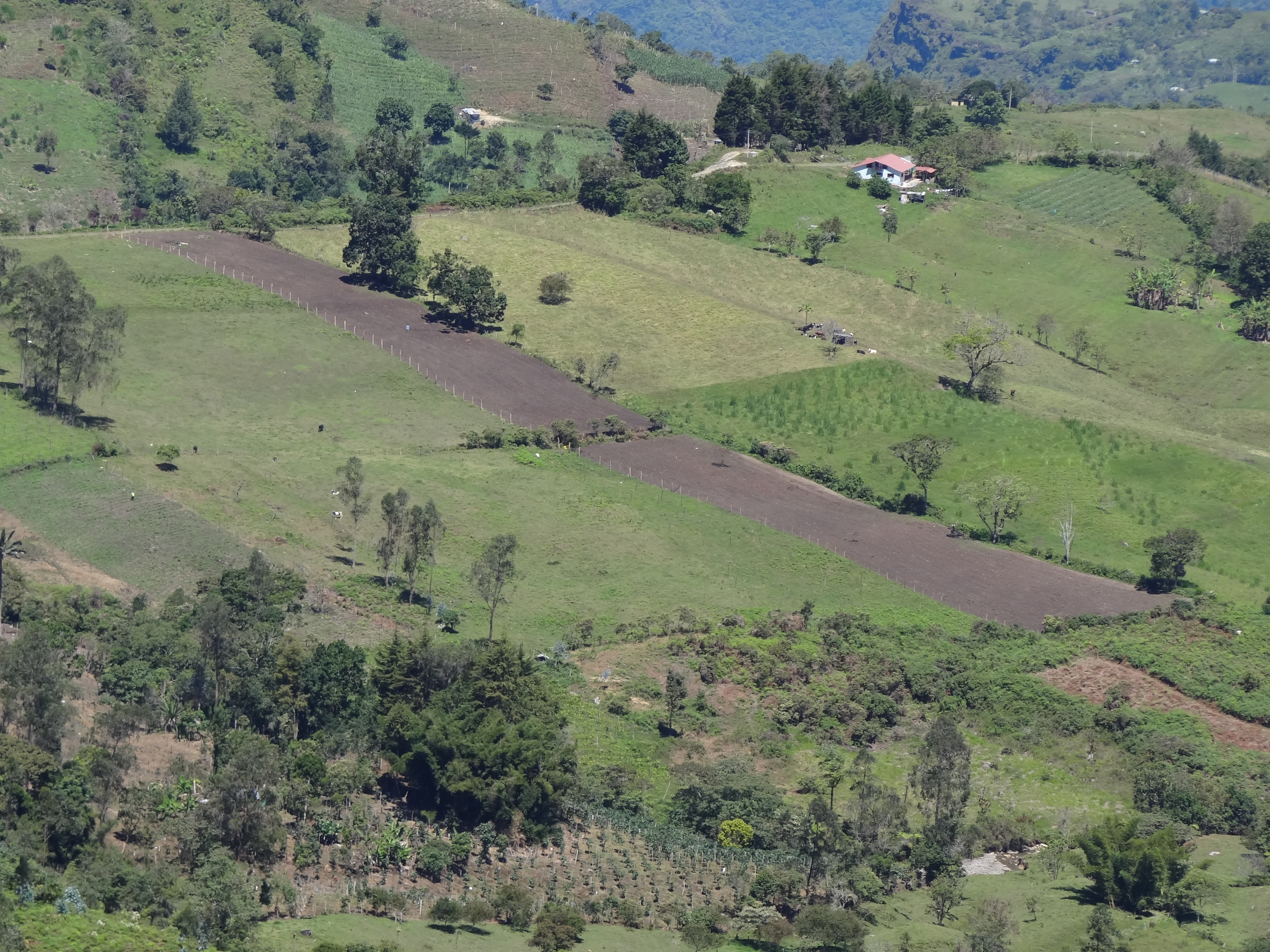 Parcelas ganaderas y frutales en un Paraje rural en la jurisdicción del municipio de Buenavista, departamento de Boyacá, Colombia